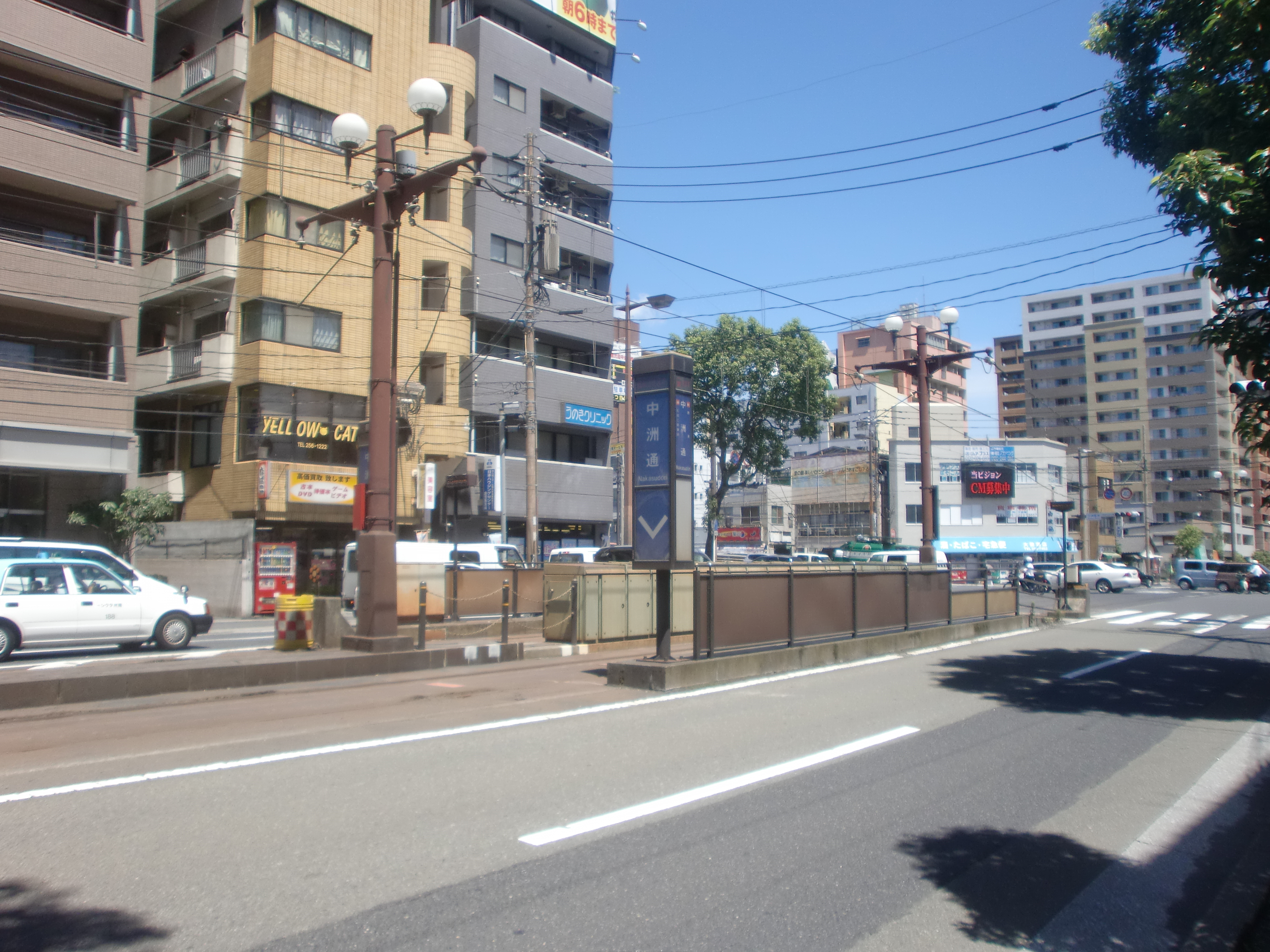 中洲通駅の外観